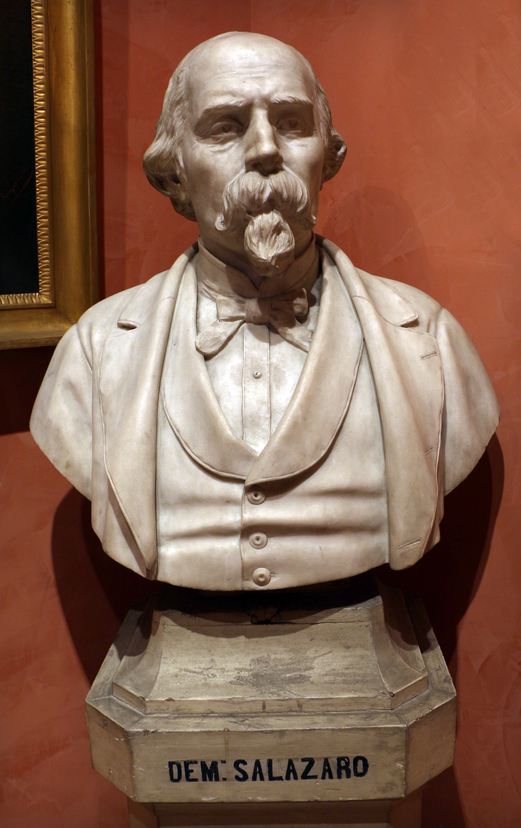 Pinacoteca civica di Reggio Calabria - sculptures This is a photo of a monument which is part of cultural heritage of Italy.